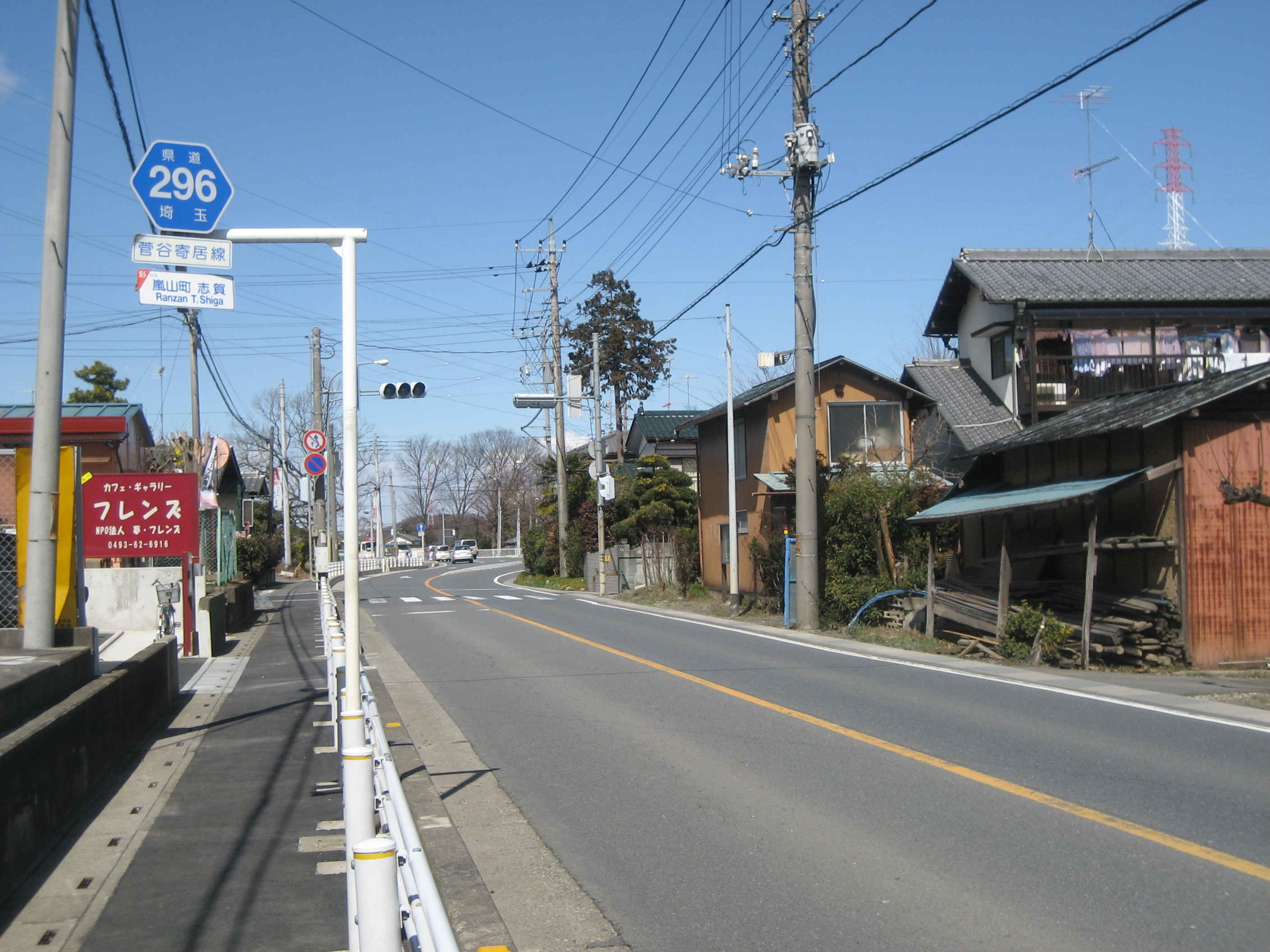 埼玉県道２９６号線嵐山町内